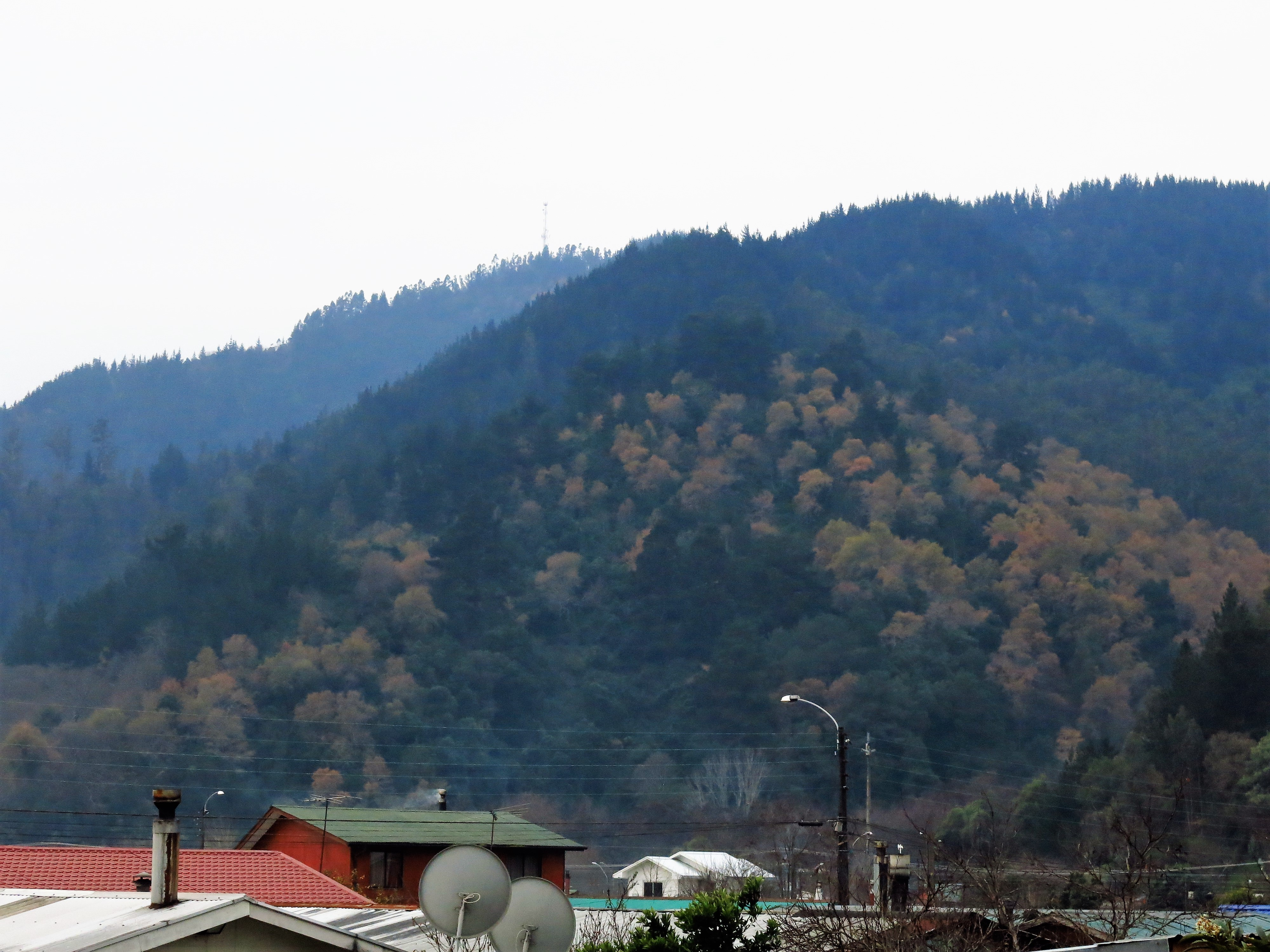 Villa Los Corales con fondo del Cerro Manquimávida.